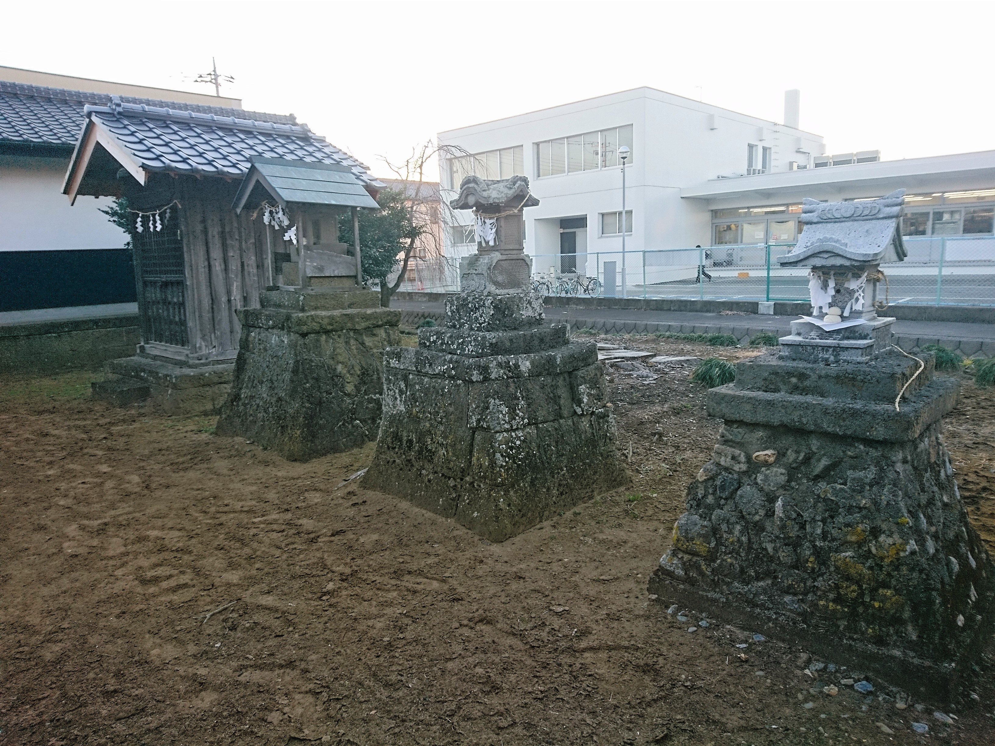 栃木市大平町富田にある富田八坂神社の境内社。左奥から右手前に祇園社、愛宕神社、雷電神社、熊野神社。